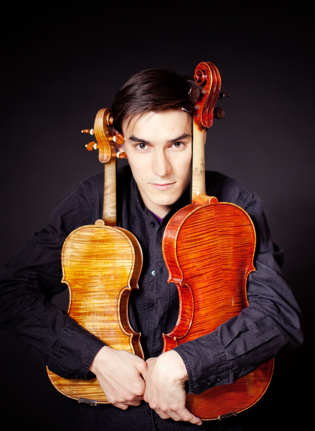 Сергей Малов, скрипач и альтист